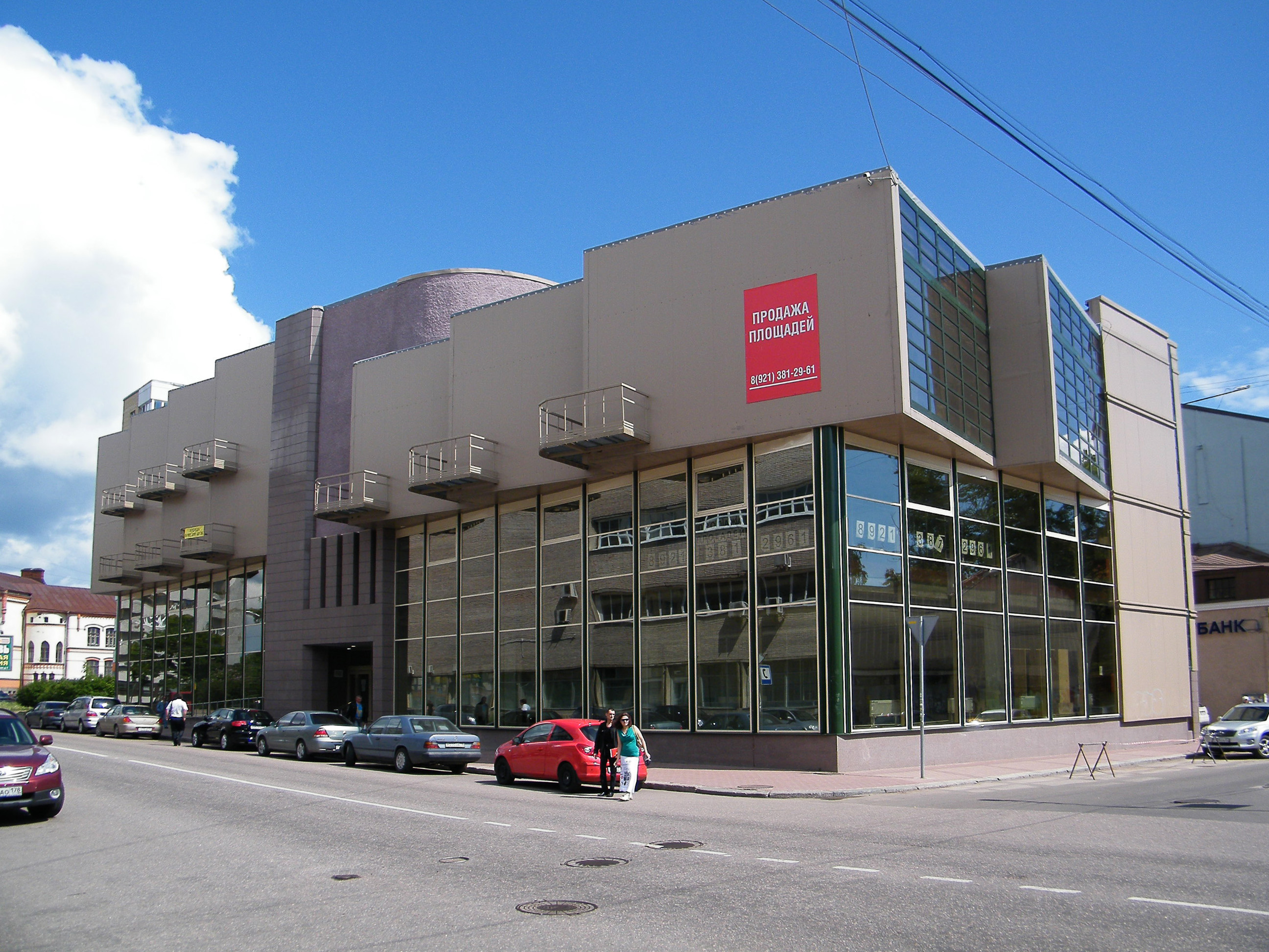 Деловой центр